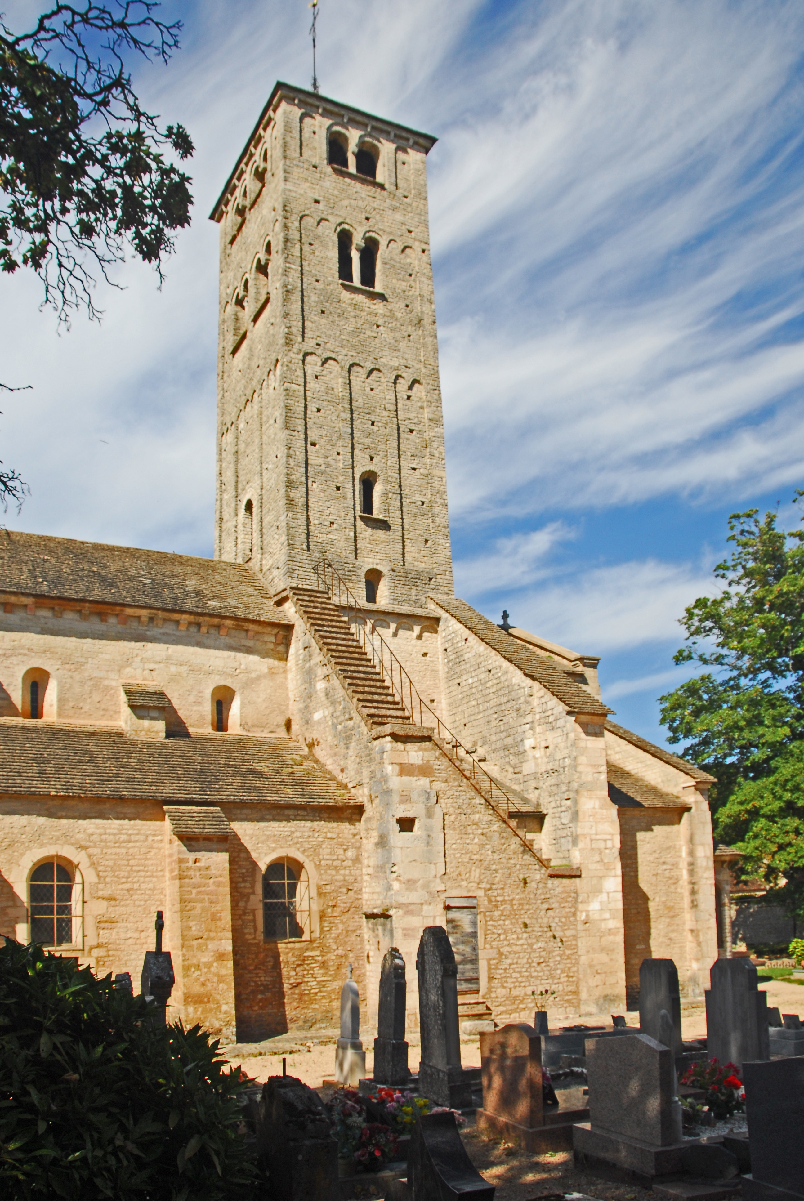 St-Martin_de_Chapaize, Querhaus mit Vierungsturm von SW